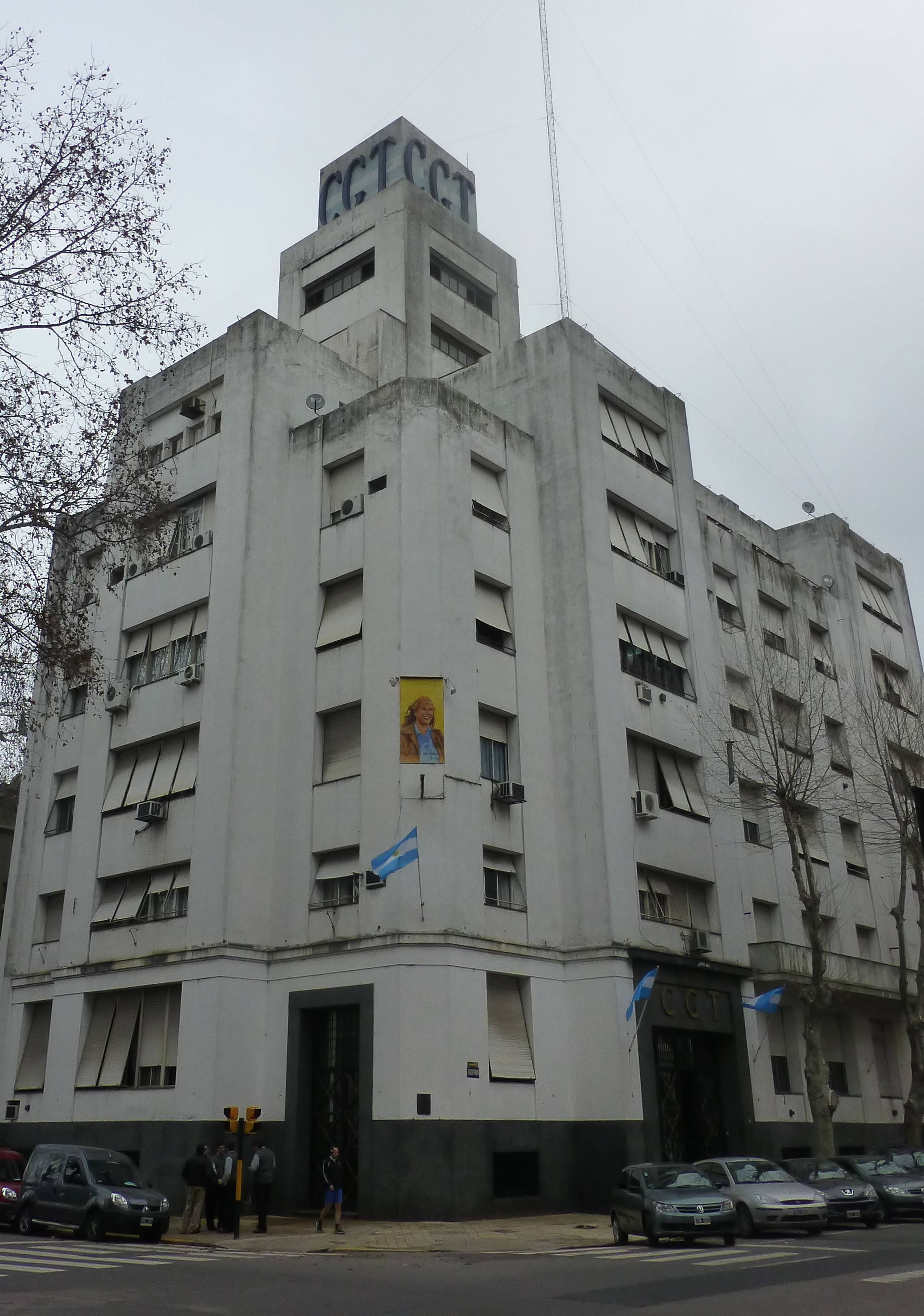 Edificio de la CGT, Buenos Aires, Argentina